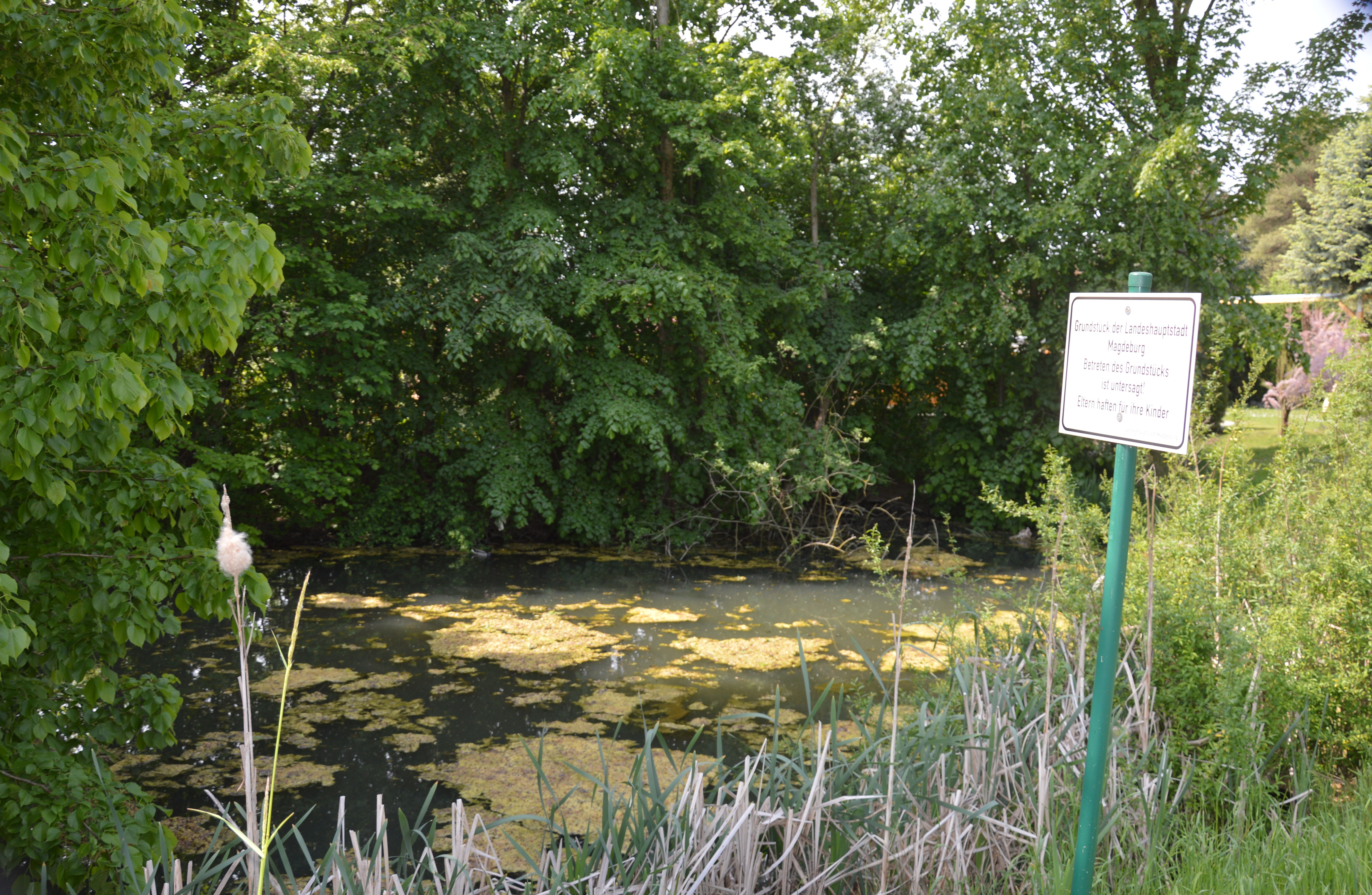 Beyendorfer Dorfteich